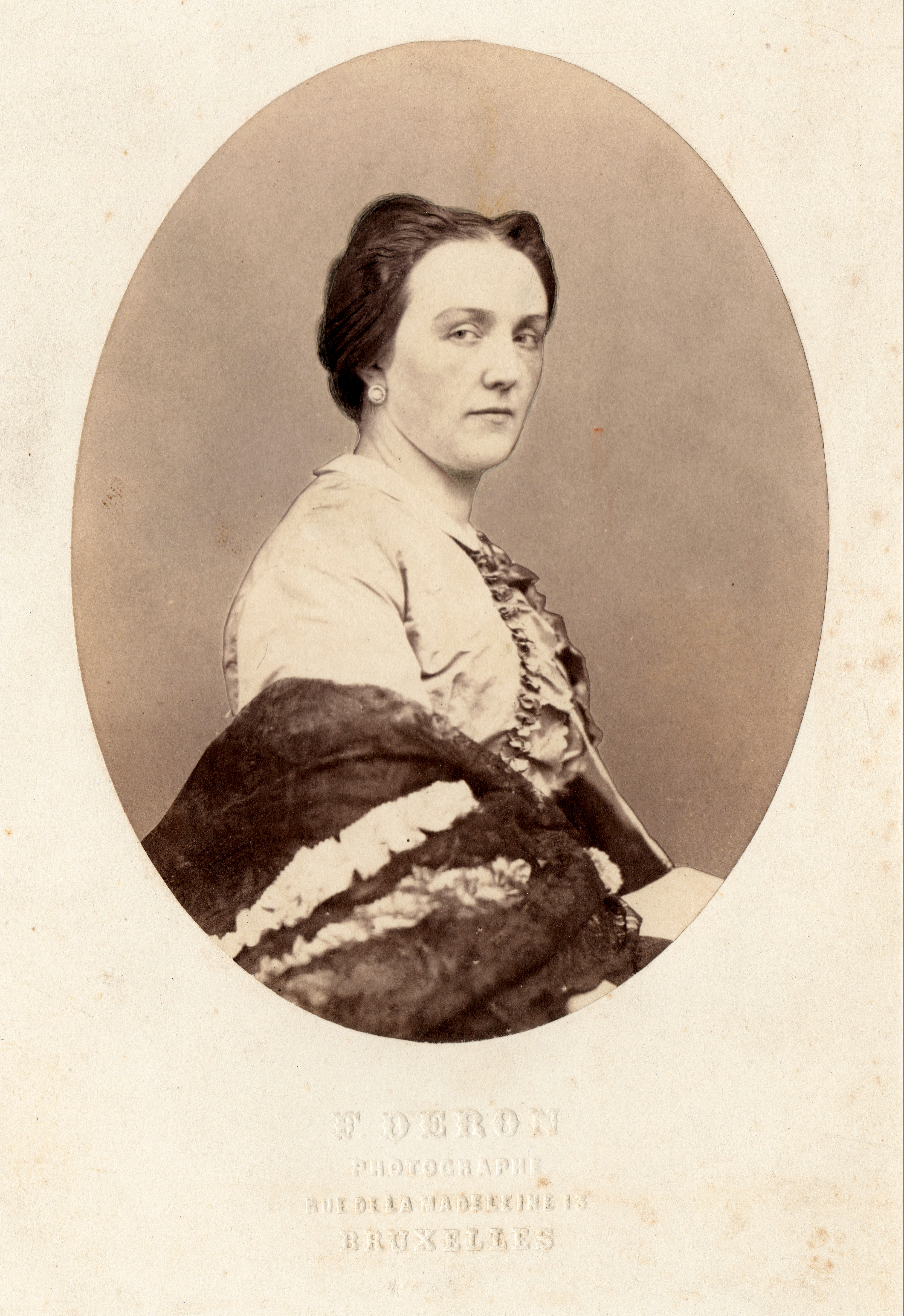 Arcadie Claret (1826-1897)